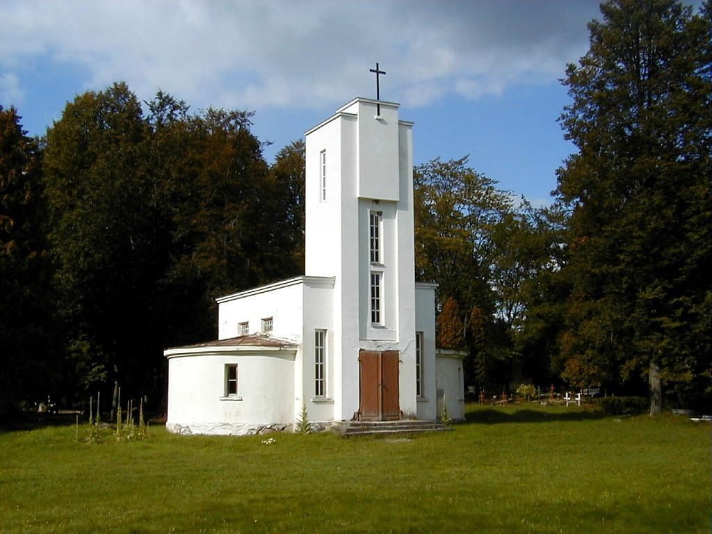 Litenes kapu kapliča 2000-09-14